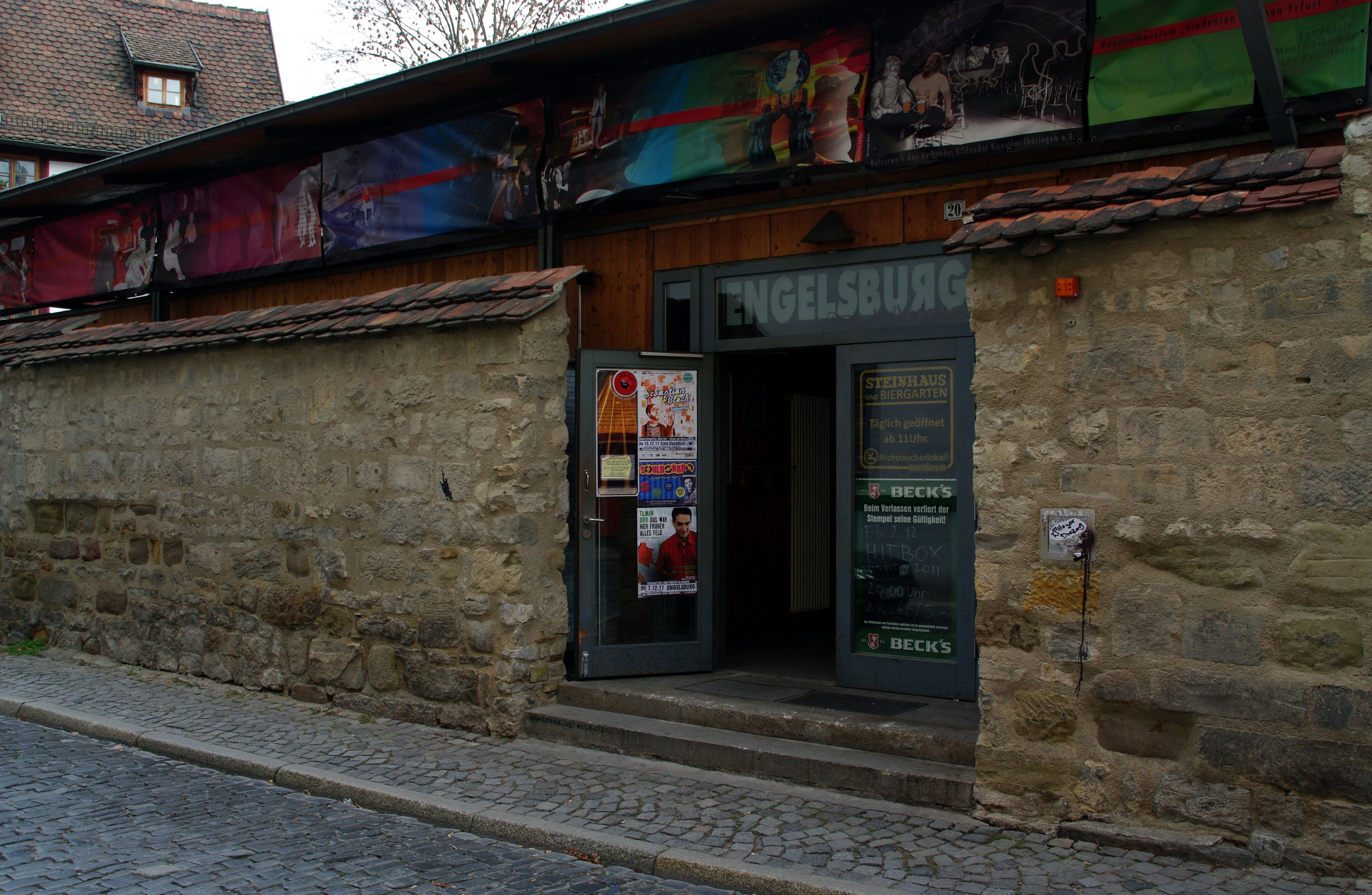 Der Eingang der Engelsburg in der Erfurter Altstadt.